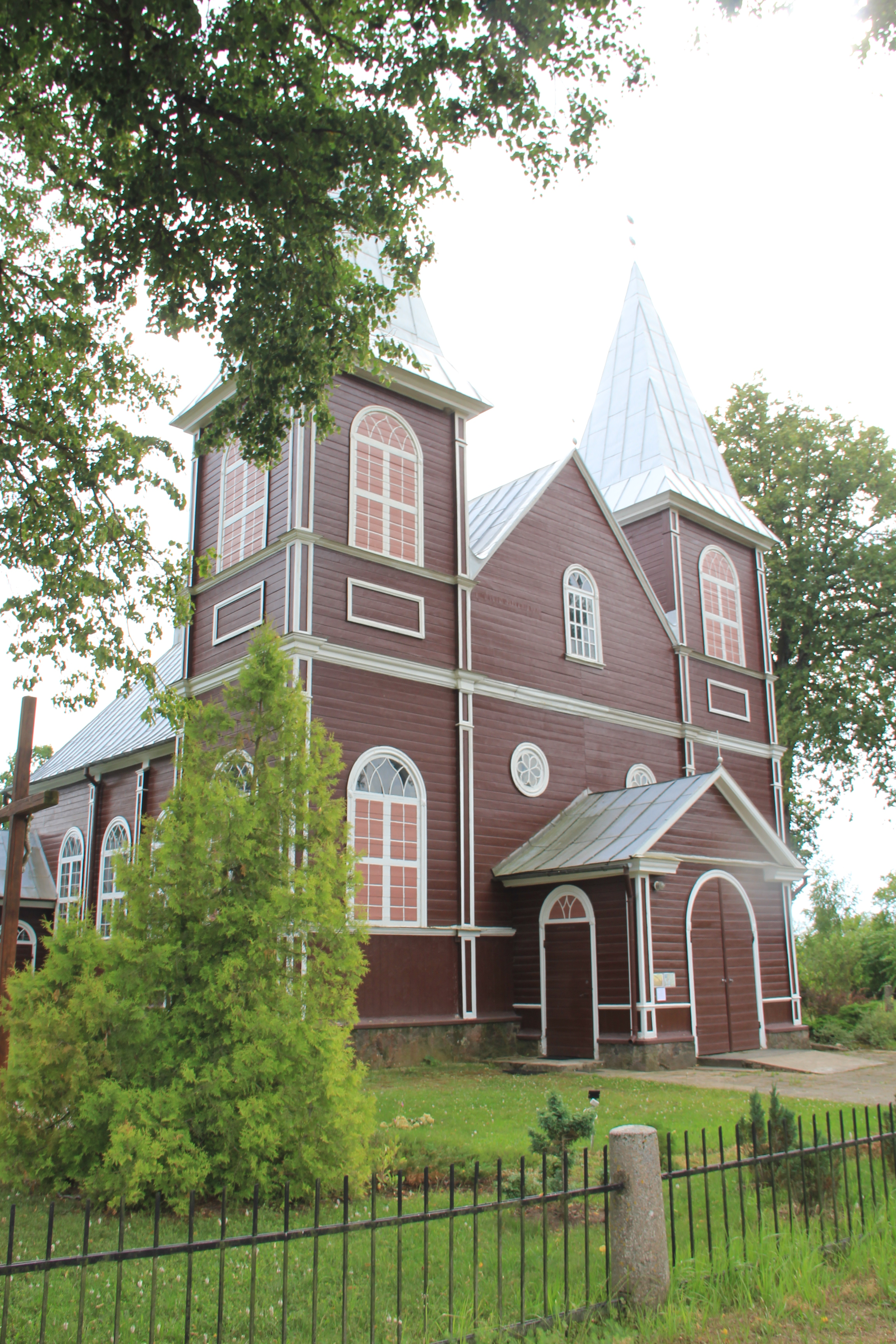 Brunavos katalikų bažnyčia